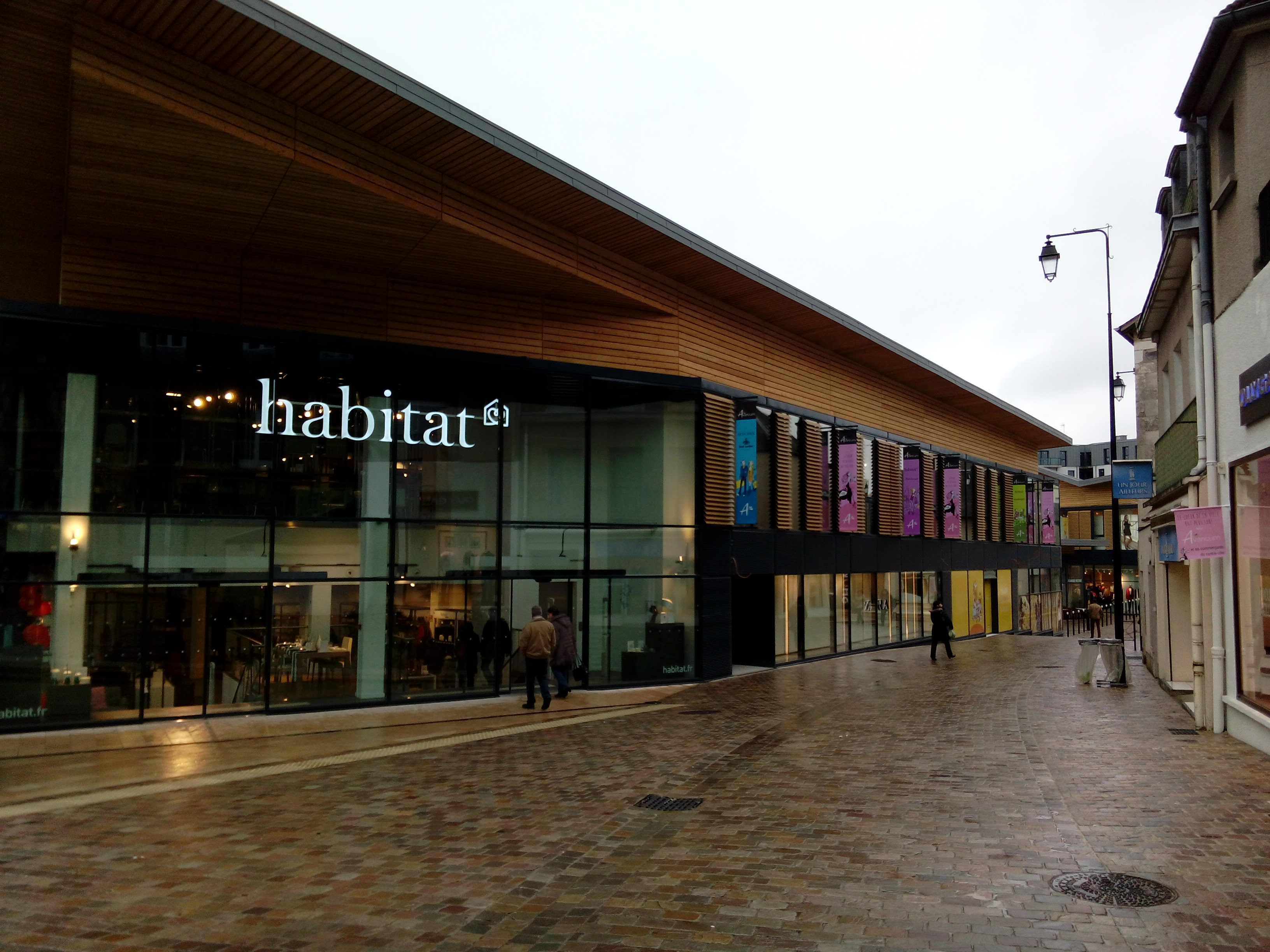 magasin Habitat Avaricum